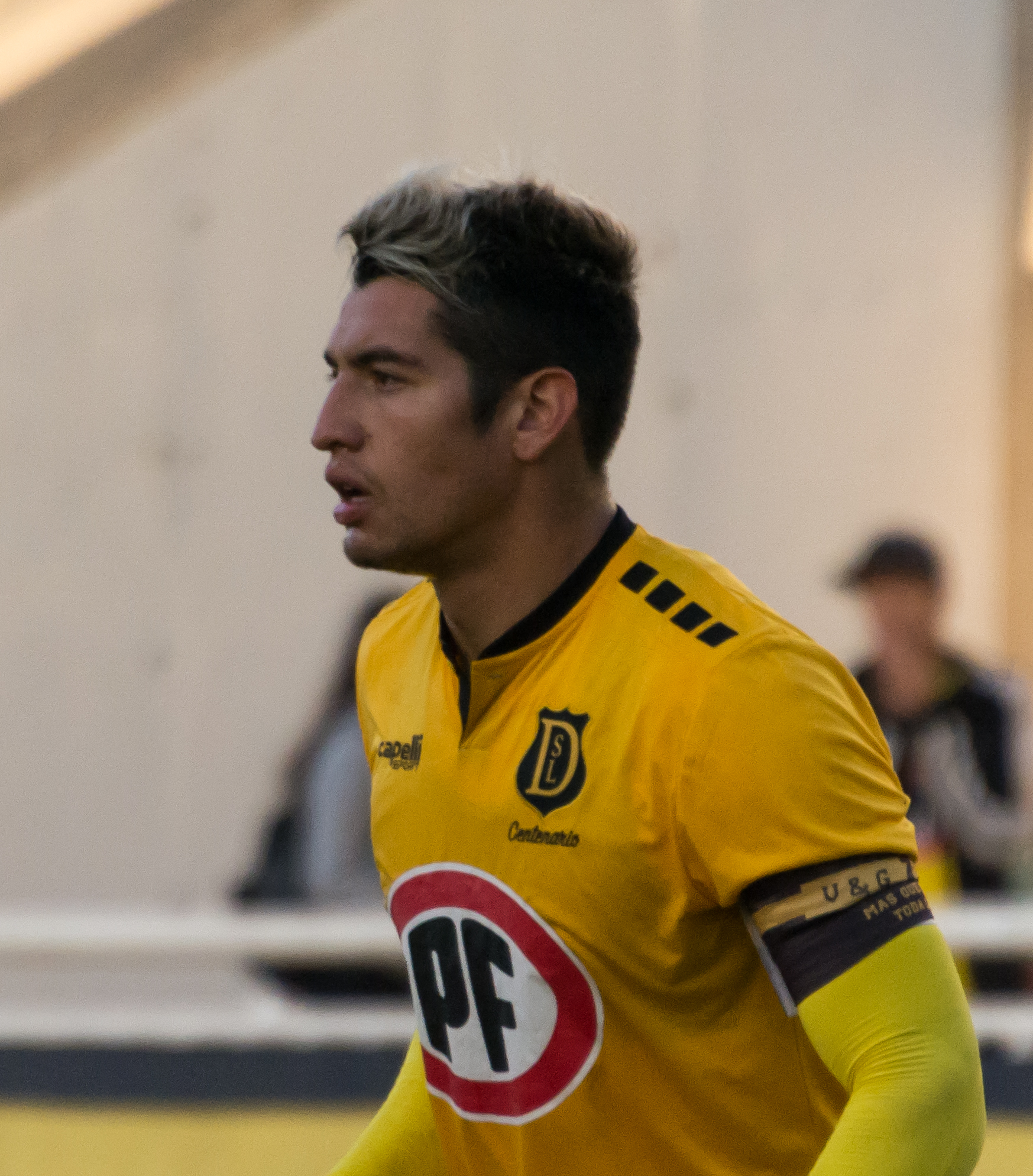 Víctor Morales, San Luis v Santiago Wanderers, Estadio Municipal Lucio Fariña Fernández, Quillota, Región de Valparaíso, Chile.